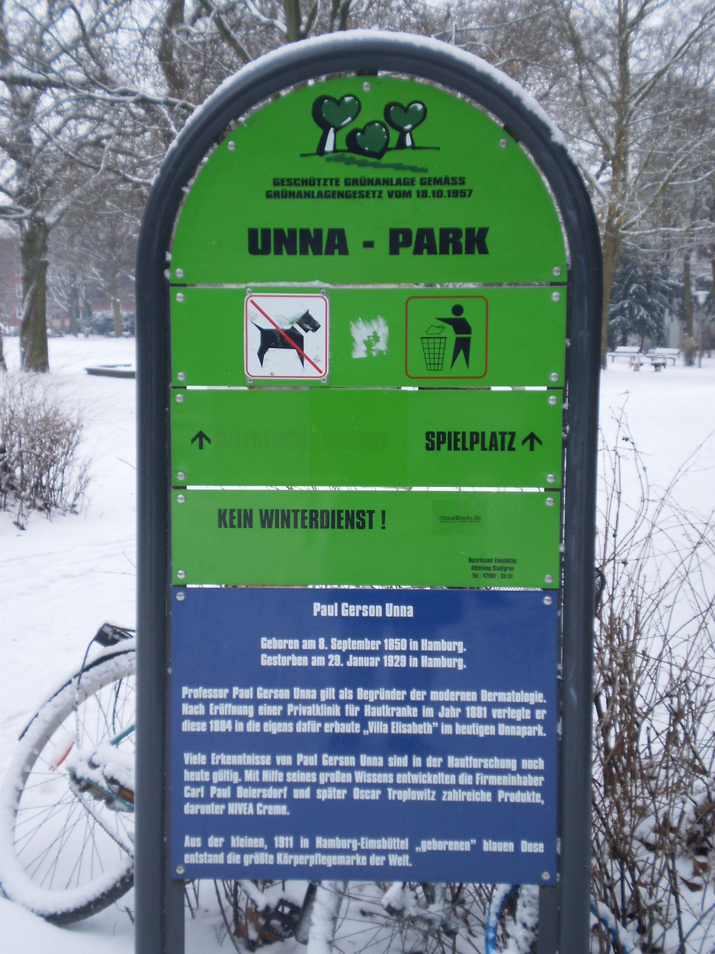 Schild am Eingang Heußweg zum Unnapark in Hamburg Eimsbüttel